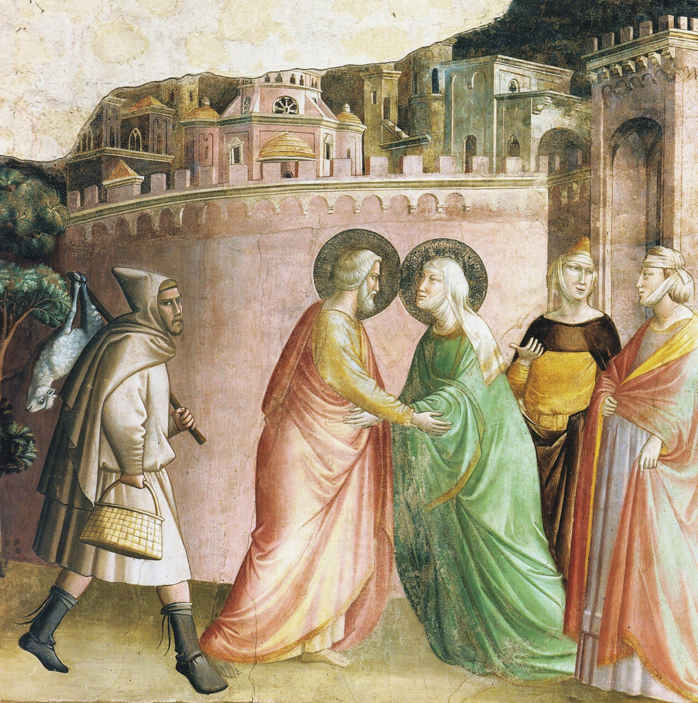 Cappella baroncelli